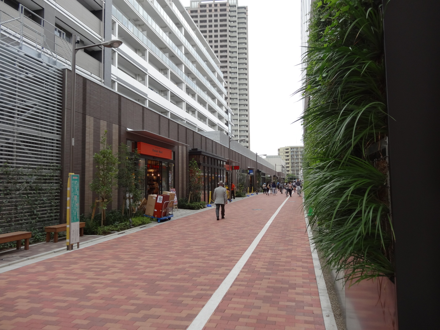 Emio-Syakujiikoen-N 2013/10/10